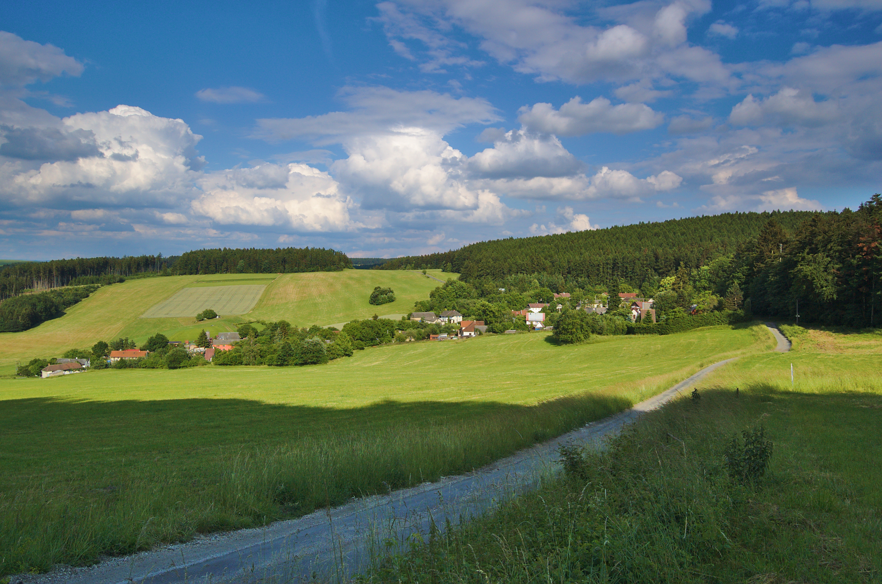 Březina, Luká, okres Olomouc